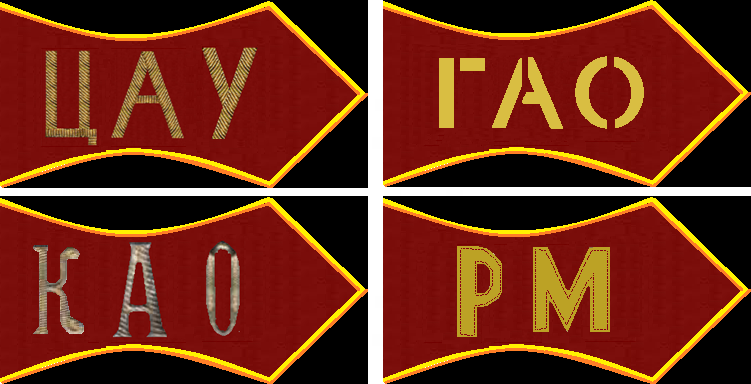 Шифровки мил 1926